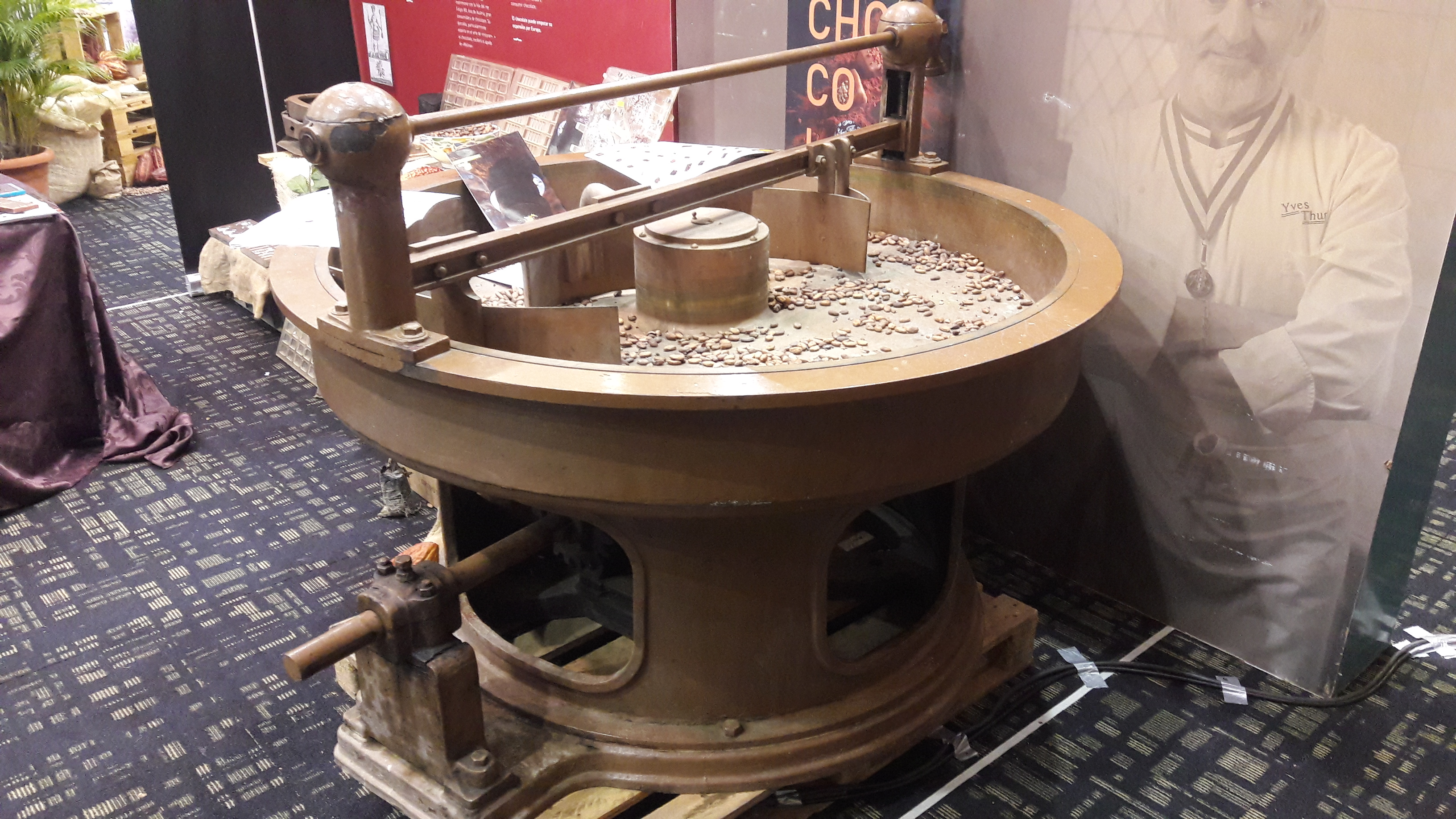 Cacao